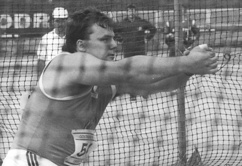 Gunther Rodehau ADN-ZB Thieme 17.8.86 Dresden: Goldenes Oval- Der einheimische Gunther Rodehau überzeugte am 16.8.86 beim Leichtathletik-Sportfest "Goldenes Oval" im Dresdner Heinz-Steyer-Stadion mit guten 81,70 m im Hammerwerfen.